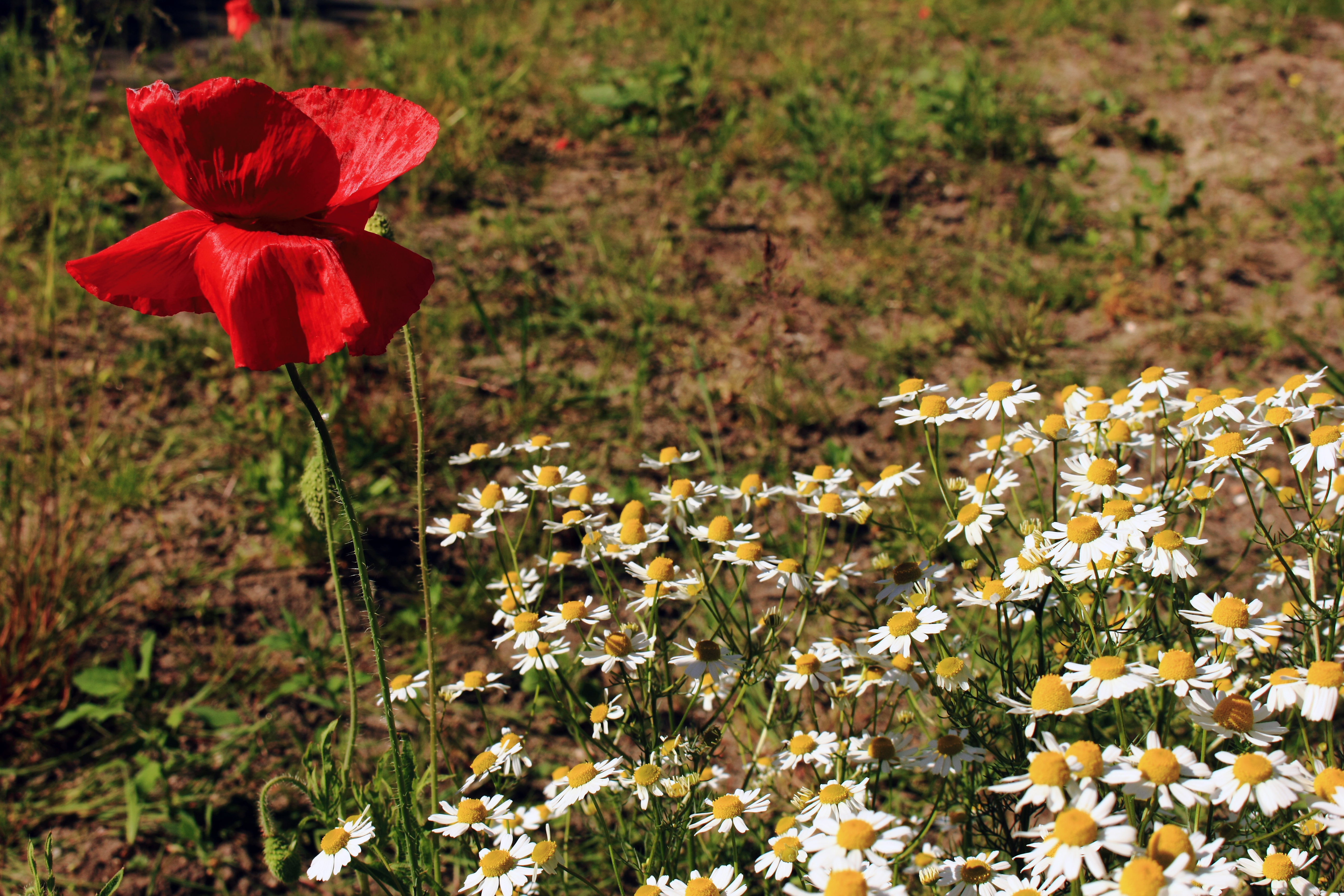 Klatschmohn (Papaver rhoeas) (04) und meines Erachtens eine Echte Kamille (Matricaria chamomilla), Altenholz-Stift